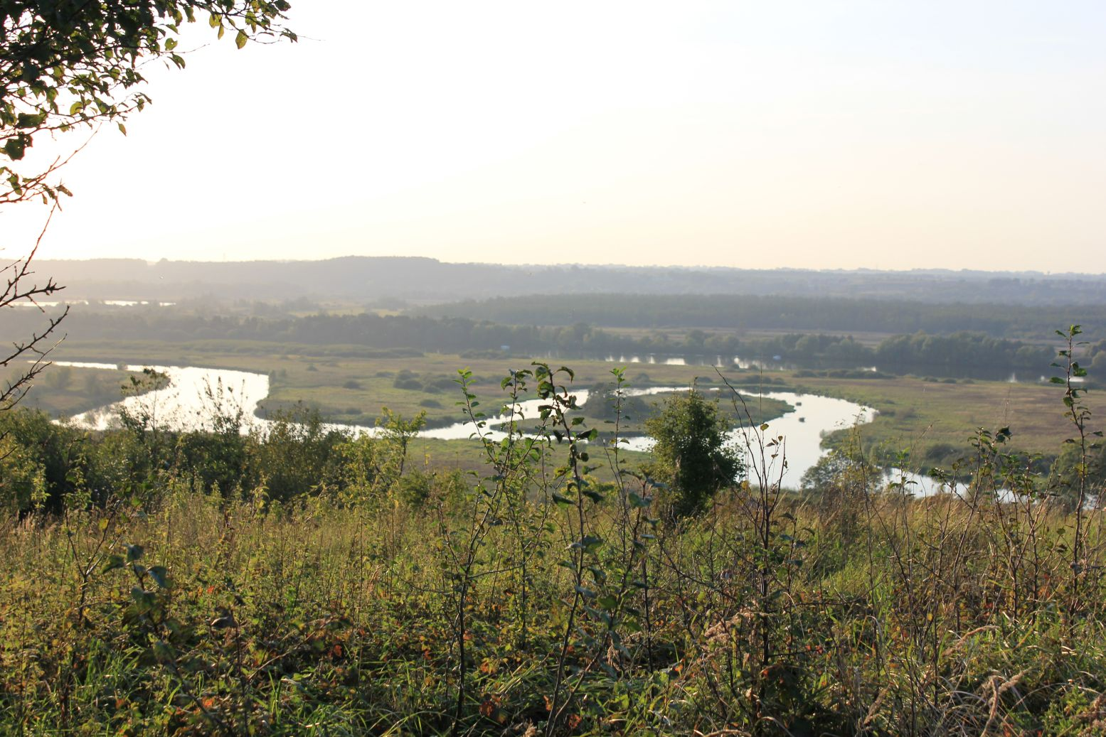 Szczecin-Klucz - Międzyodrze. W tle Wał Stobniański.